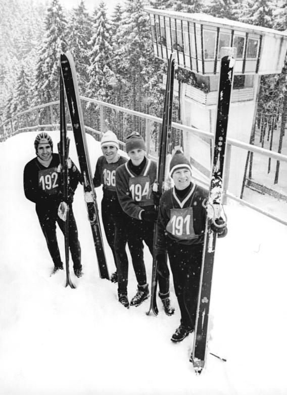 Zentralbild Thieme 29.12.1968 Johanngeorgenstadt: Saisoneröffnung der Nordisch-Kombinierten Lothar Düring (Dynamo Georgenstadt, rechts) gewann am 28.12.1968 den Saisoneröffnungs-Wettbewerb in der Nordischen Kombination mit der Note 415,5 vor Roland Weißpflog (SC Traktor Oberwiesenthal, links) mit 404,25 und dem Olympiadritten Andreas Kunz (SC Dynamo Klingenthal, 2.v.l.) mit 402,25 Punkten. Im Vorderfeld konnte sich auch der junge Klingenthaler Reiner Hamann (2.v.r.) plazieren.